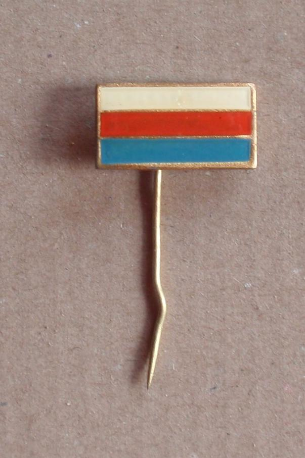 Odznak - Moravská vlajka. Takto odznak identifikuje stránka Numismatika Zlatá koruna "Numismatika, která jde s dobou" Romana Repky. Dobou vzniku je odznak povšechně zařazen do období "před rokem 1950". K bíločervenomodré trikolóře historicky zachycující jednu z verzí vlajky Moravy se dále poznamenává, že ji údajně používali i (již) zástupci česky mluvících Moravanů na Slovanském sjezdu v roce 1848. V podobě bílo-červeno-modré trikolóry je historicky zachycena Jedna z verzí vlajky Moravy. Historická moravská vlajka v této podobě je na předmětech dále zachycena např. vlající na stožáru před Besedním domem v Brně - v roce 1905, na sklenici uložené v Moravském zemském muzeu. Poznámka 1: Bíločervenomodrá trikolóra (trikolóra v tomto pořadí barev) je rovněž státními barvami České republiky (jeden ze státních symbolů České republiky). Poznámka 2 k dataci a určení: Problémem může být už ten pohár (Besední dům): jak víme, že je z roku 1905 a ne až z první republiky (státní trikolóra) či dokonce protektorátu (protektorátní vlajka)? Pokud opravdu z roku 1905, pak by bylo možné o těchto barvách tvrdit, že jsou moravské (či "prohozené panslovanské", jak by také mohl někdo namítnout apod.). Totéž platí pro odznáček trikolóry. Lze pochybovat, že by byl před rokem 1918, a pro datování by se musel srovnat s nějakou sbírkou odznáčků (zda je vůbec z první republiky, nebo až z 2. poloviny 20. století) - způsob výroby (materiál, povrch, typ jehly a její uchycení). Pro dobu před rokem 1918 by se daly předpokládat spíše smaltované odznaky (ne vylívané) apod. (více řemeslně ozdobné - "secesní").